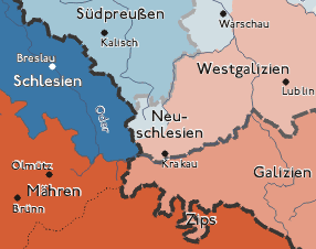 Karte, Neu Schlesien, preußische Provinz 1795-1807